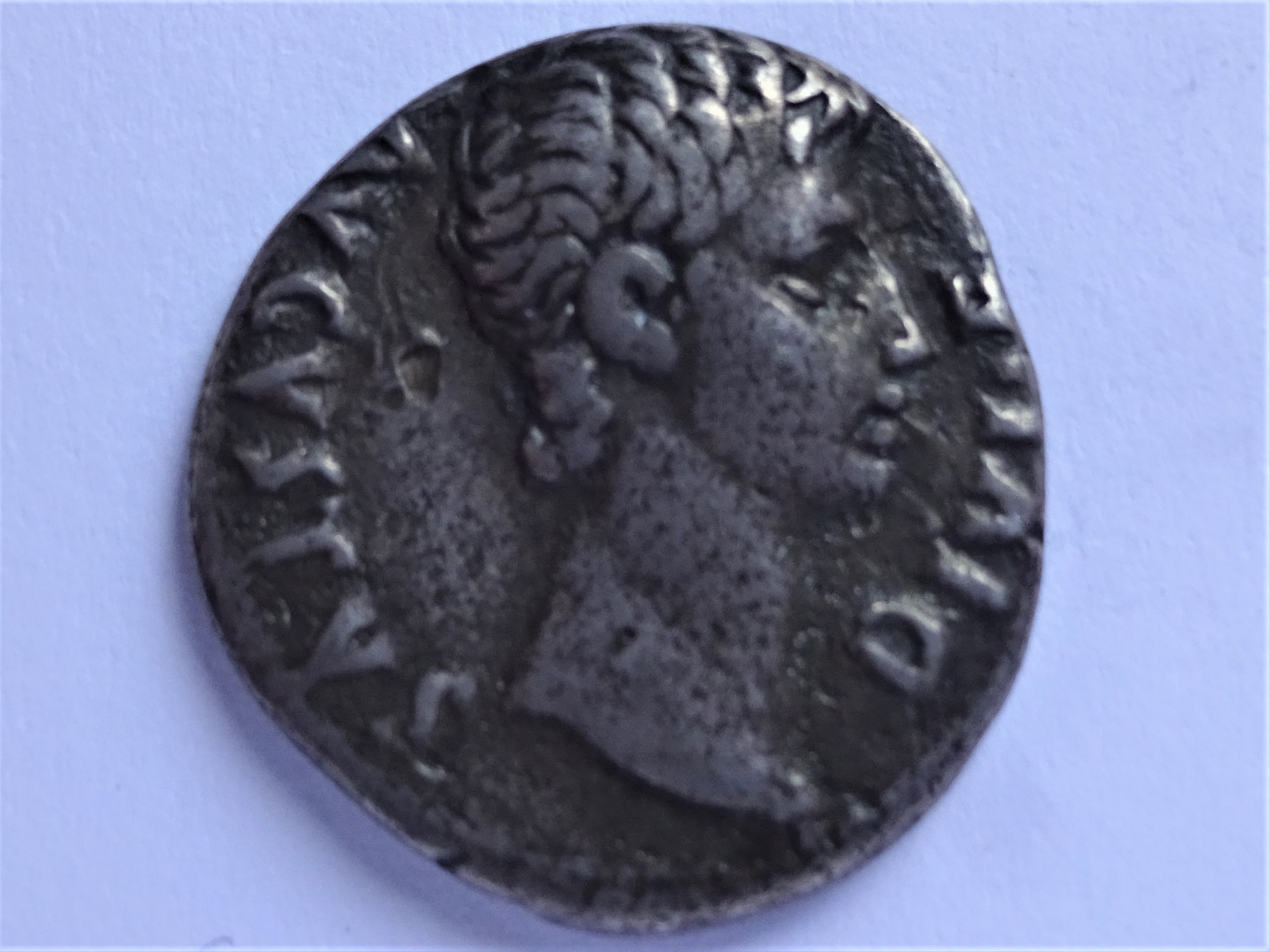 Portraitseite des Denars auf den Sieg von Actium, Kampmann 2.59